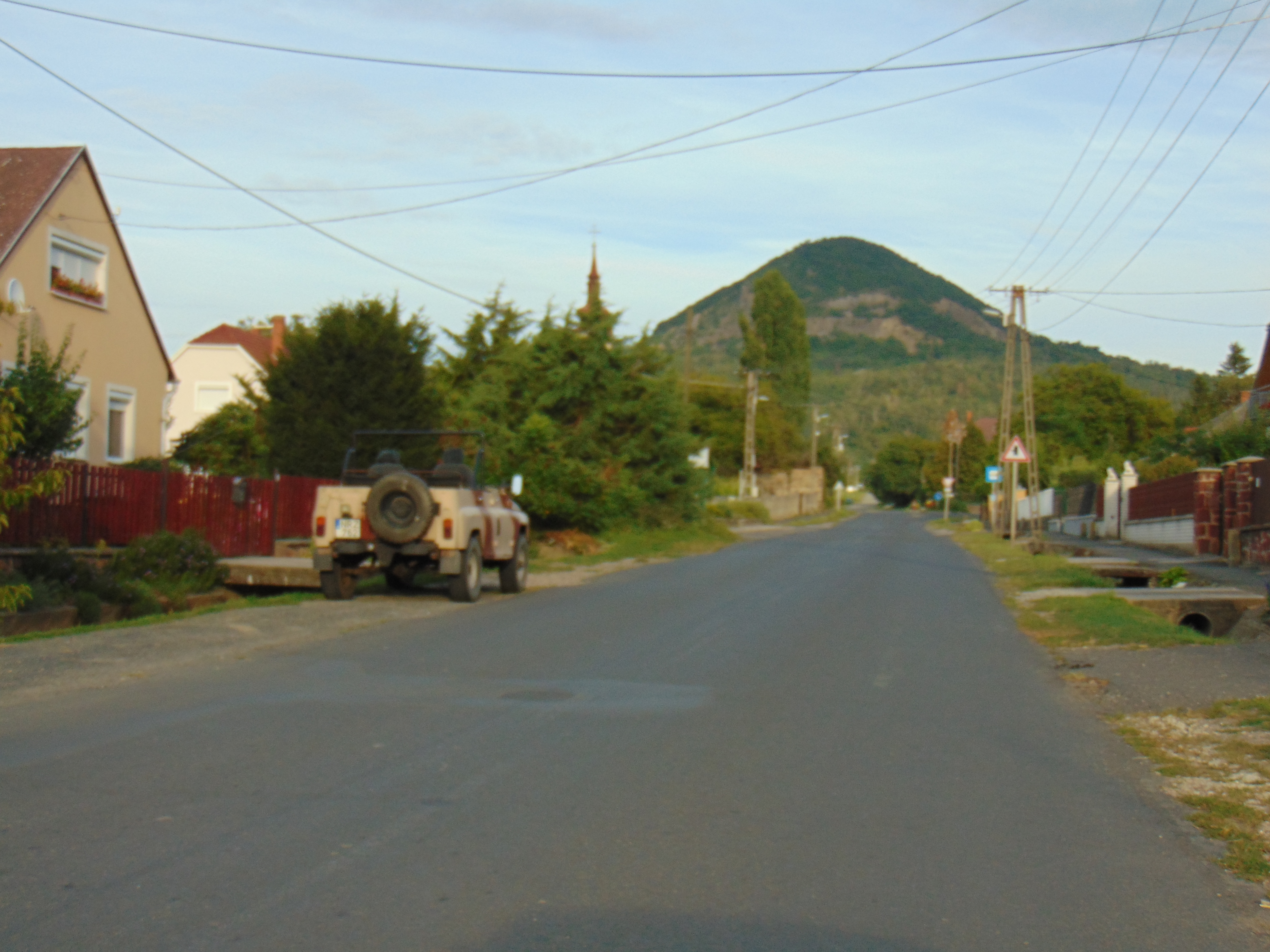 A 7345-ös út Nemesgulács belterületén, háttérben a Gulács